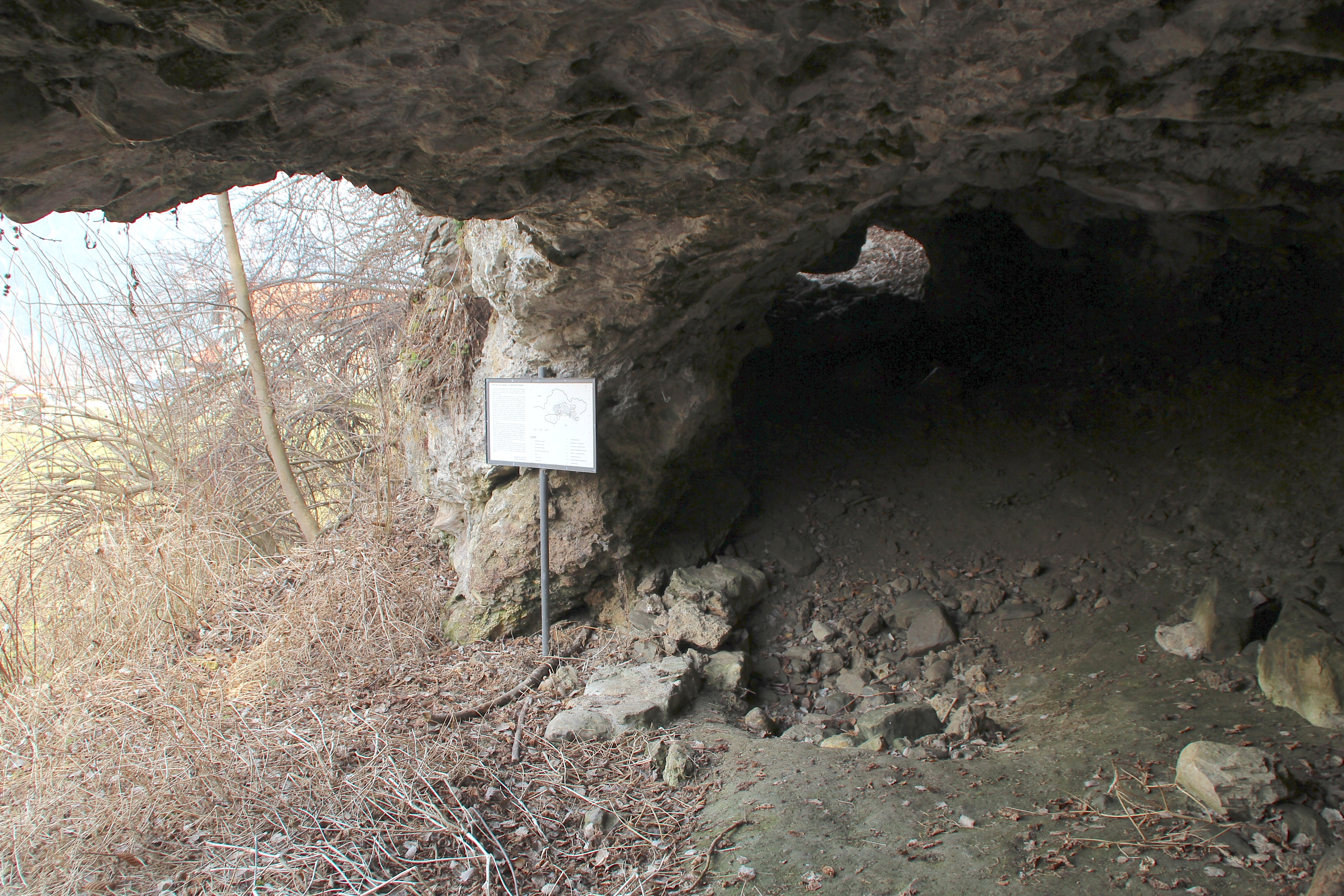 Kulthöhle Zillis